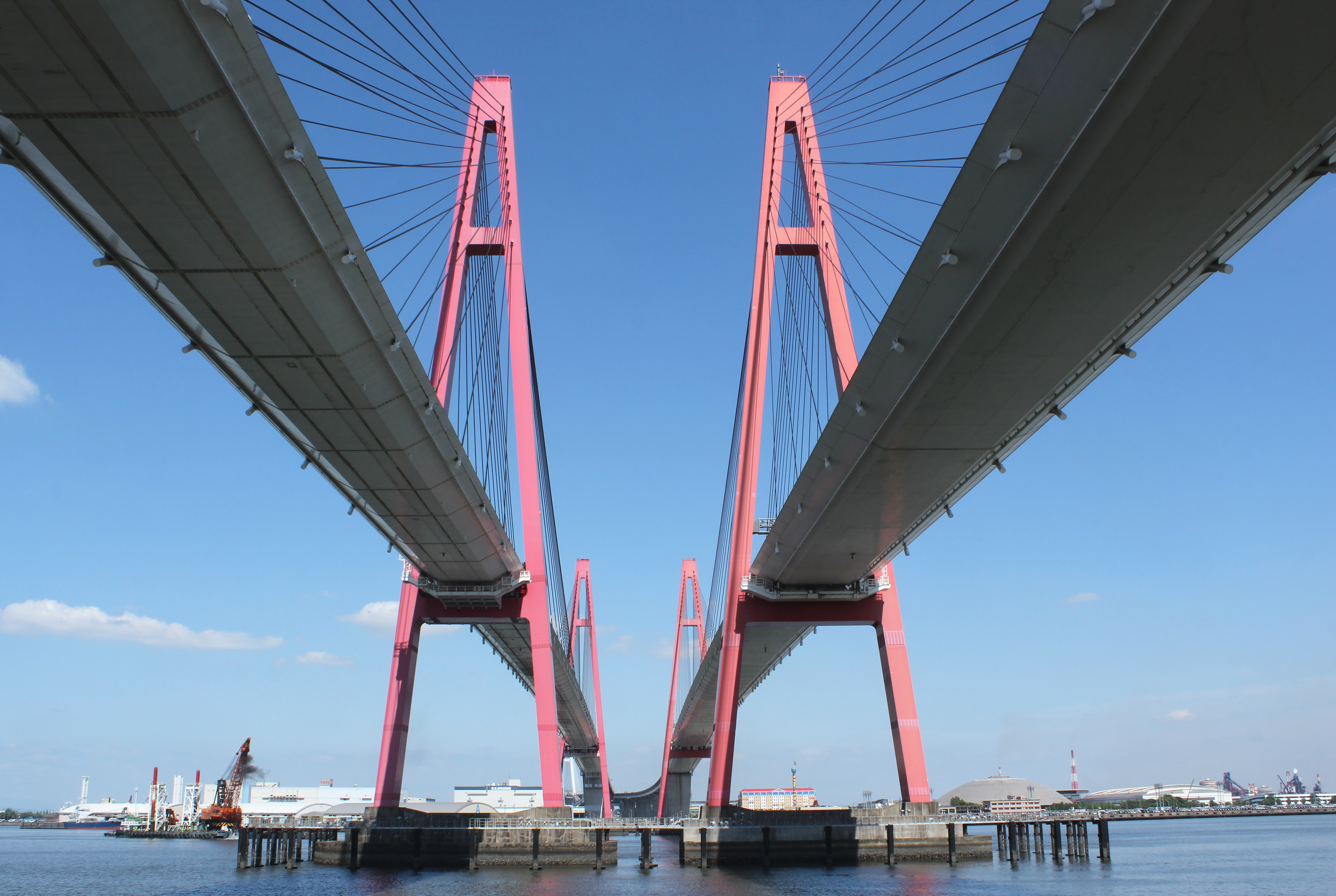 名港西大橋 Canon EOS Kiss X5